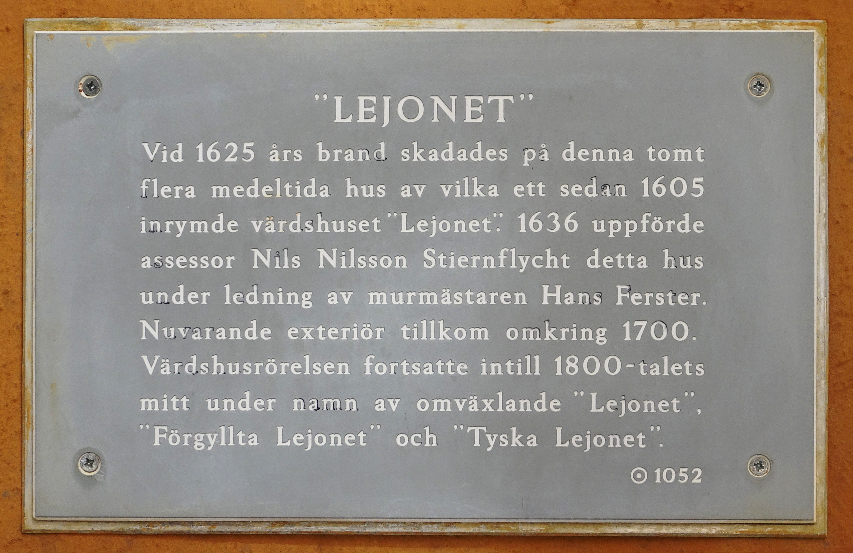 Fastigheten Atlas 8 vid Tyska Brinken, tidigare plats för den kända krogen "Förgyllda Lejonet"